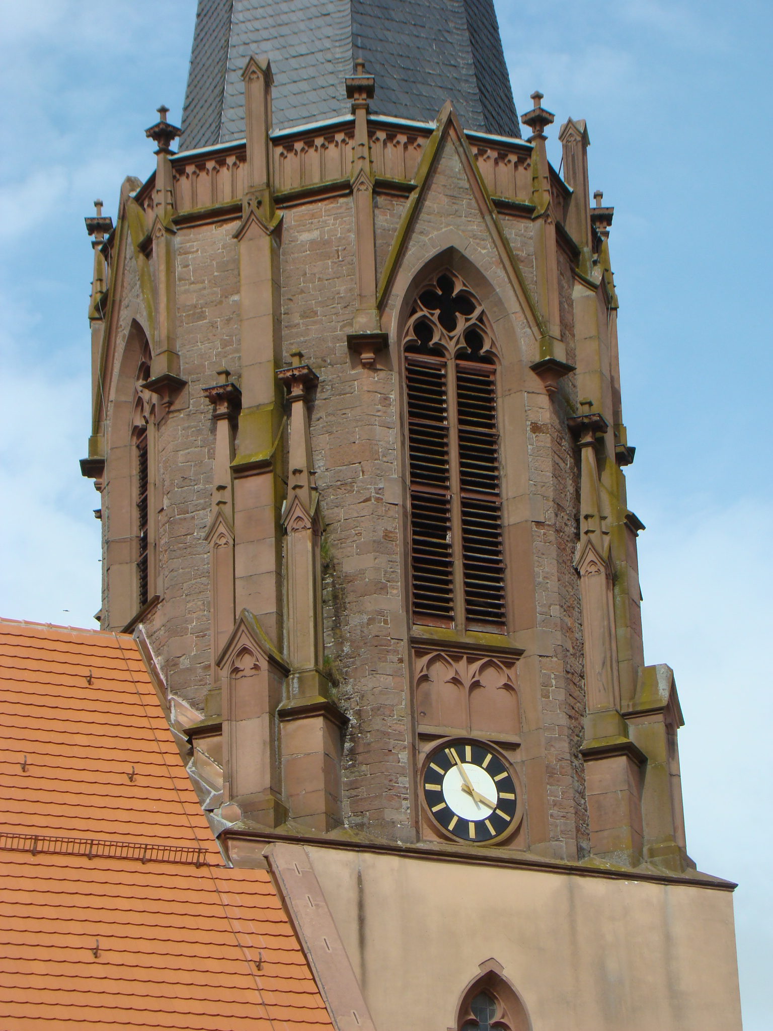 Buchen-Bödigheim, Kirchturm